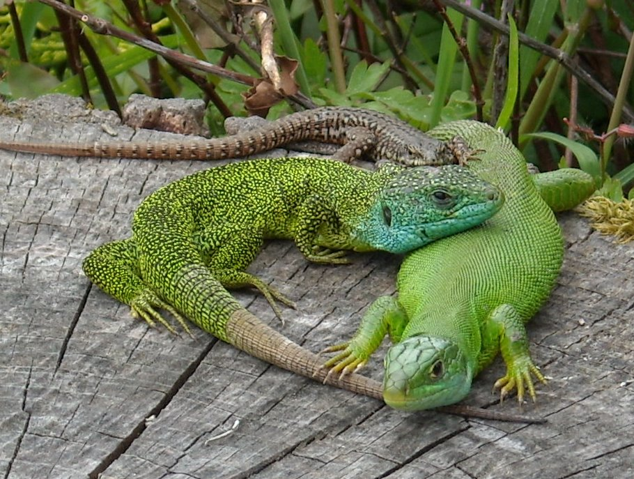 Couple de lézard vert avec un lézard des murailles (gris)